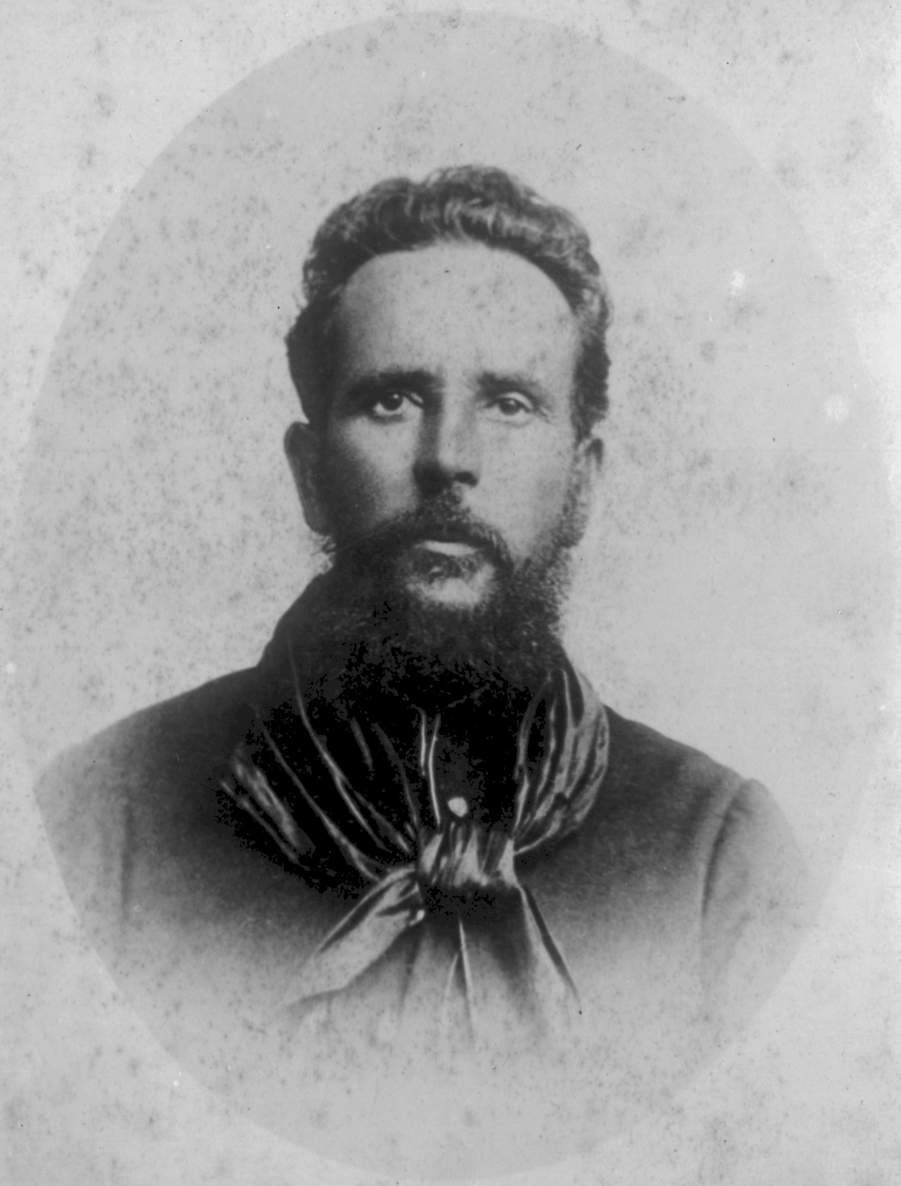 Fotografía del militar y político de Uruguay, Aparicio Saravia (1856 - 1904)